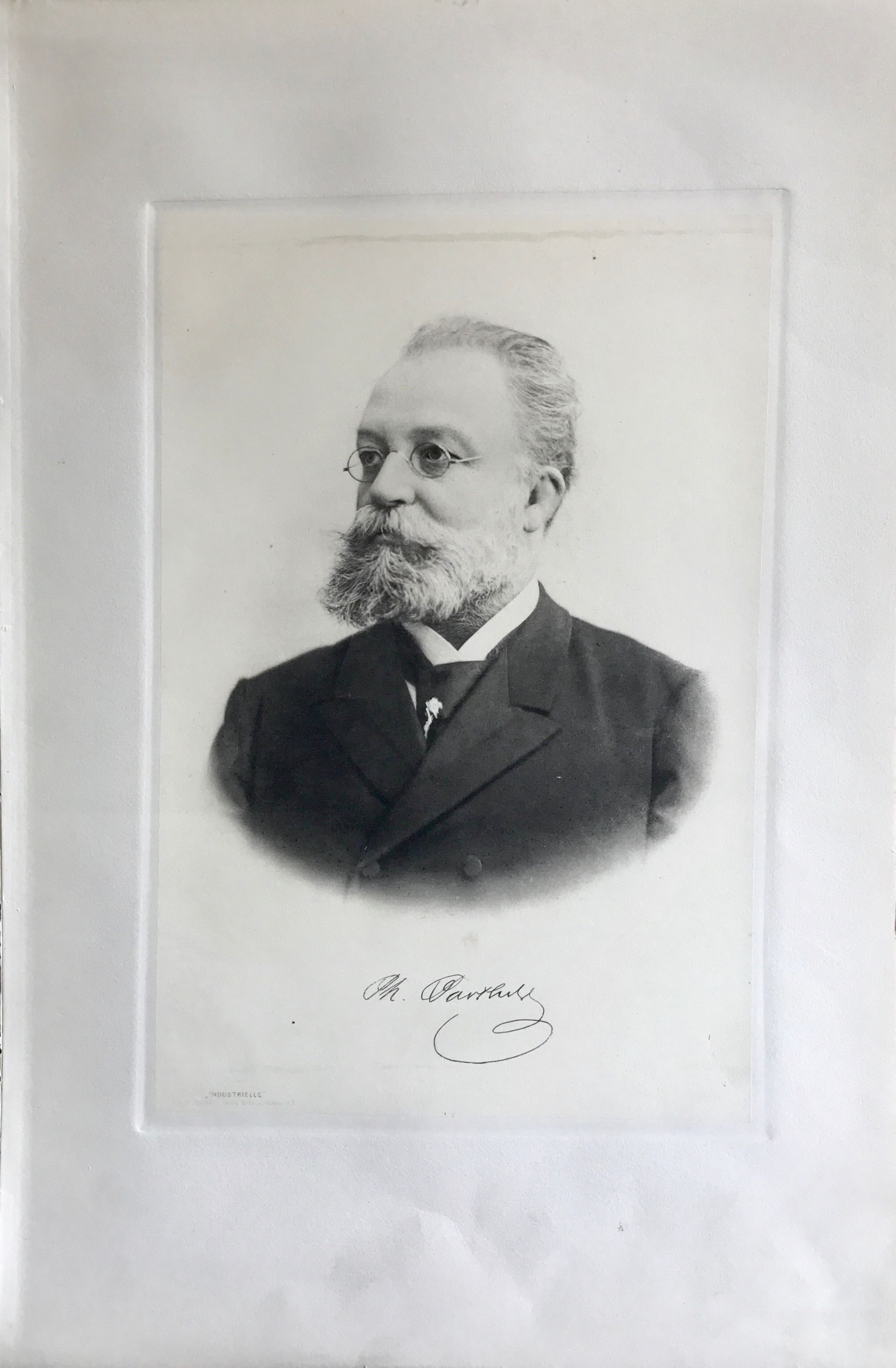 Bild Philipp Barthels